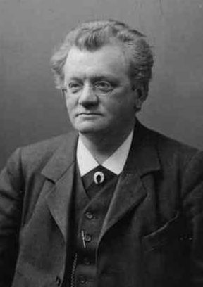 Komponisten og pianisten Siegfried Langgaard 1852-1914 Danish composer and pianist Siegfried Langgaard 1852-1914